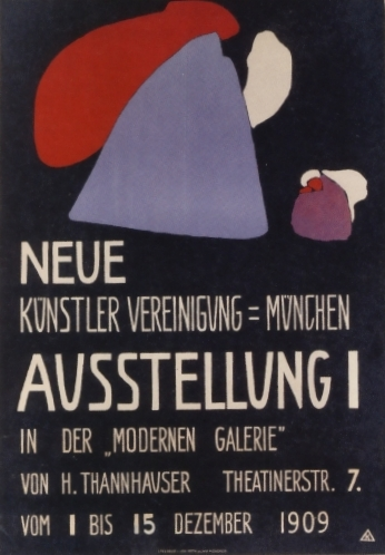 Ausstellungsplakat der Neuen Künstlervereinigung München zur 1. Ausstellung in der Galerie Thannhauser 1909